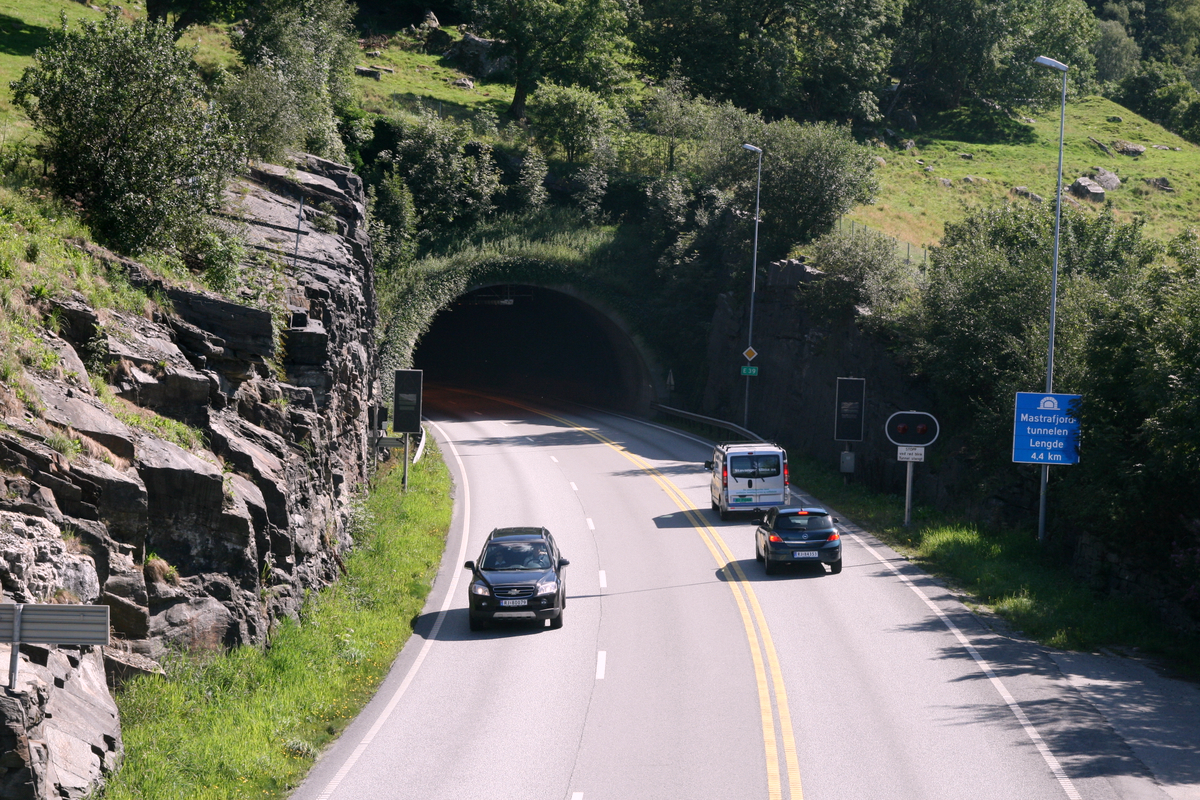 Mastrafjordtunnelen